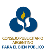 Logo actual del Consejo Publicitario Argentino